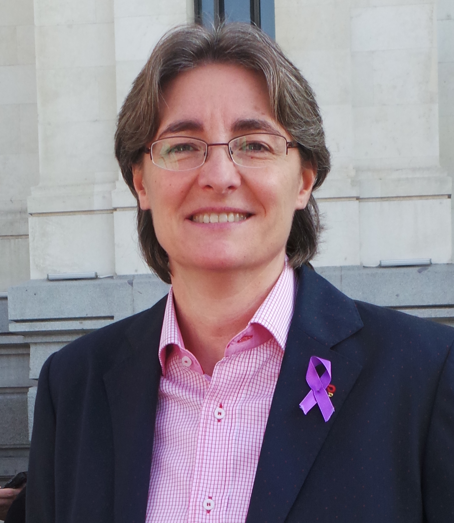 Marta Higueras en la puerta del Ayuntamiento de Madrid en el despliegue de la pancarta contra la violencia de género del 7N